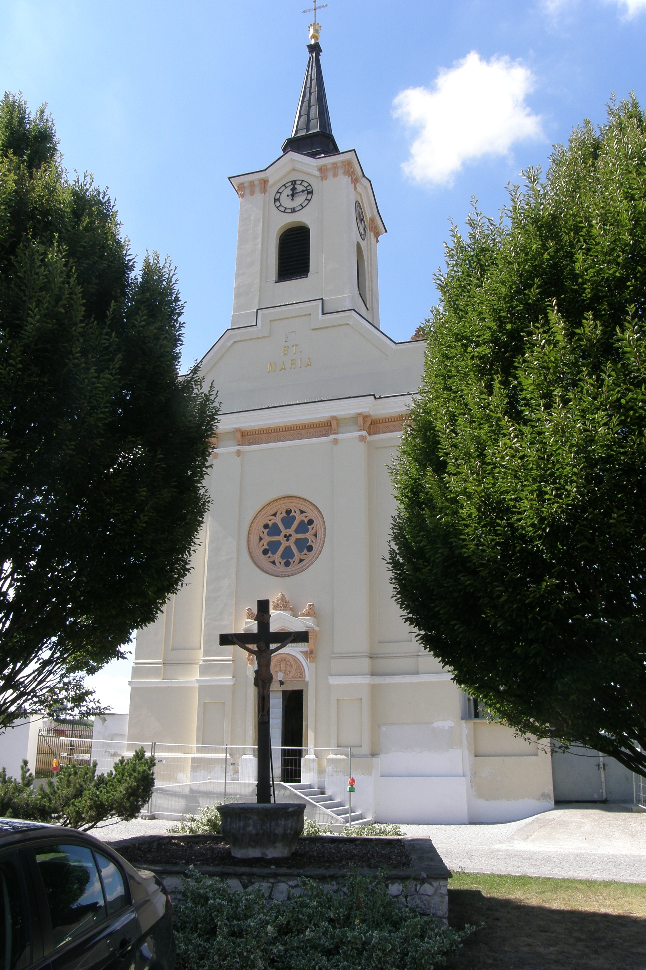 Kath. Pfarrkirche Mariae Namen in Wetzelsdorf